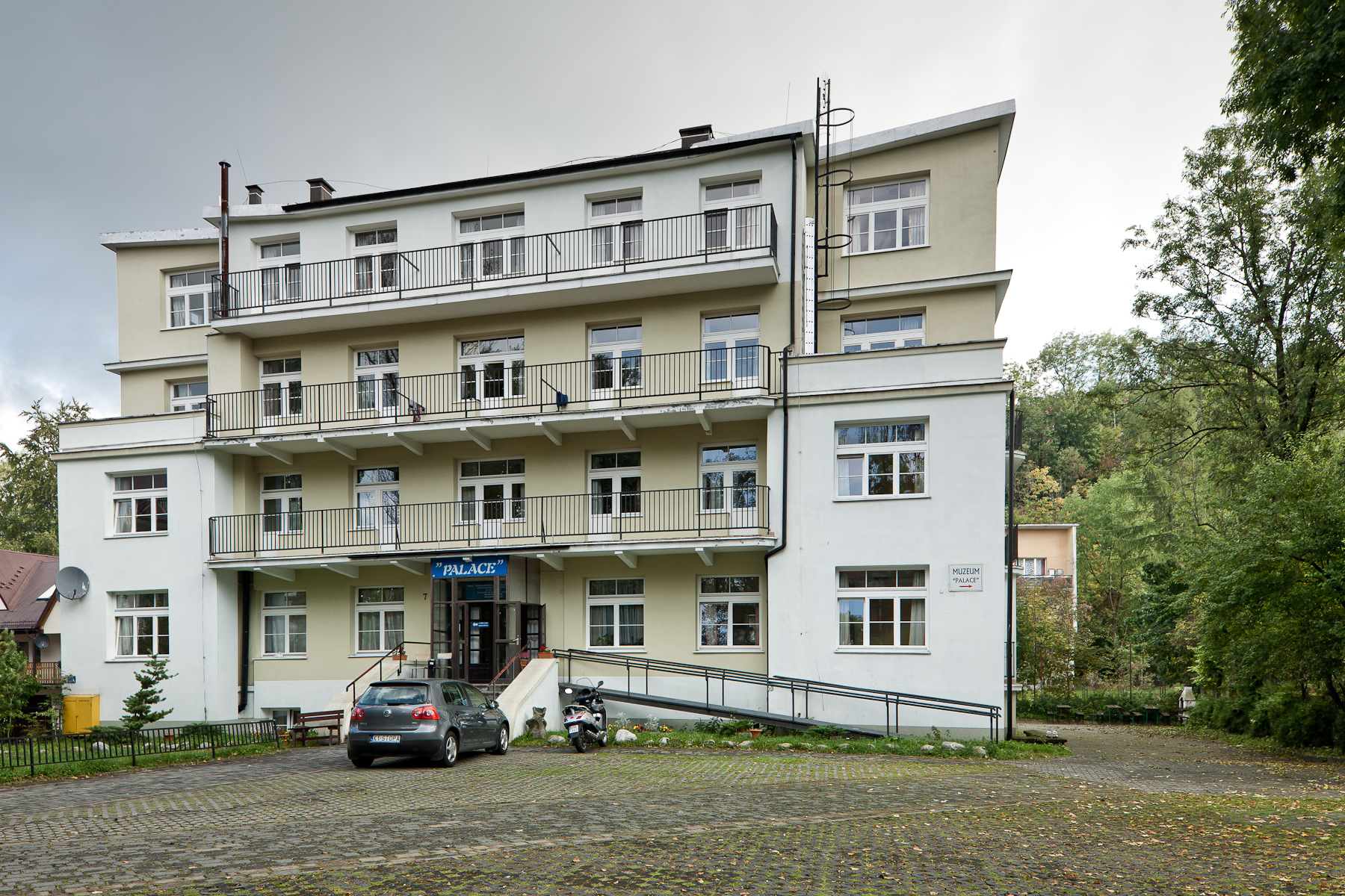 Palace, Zakopane